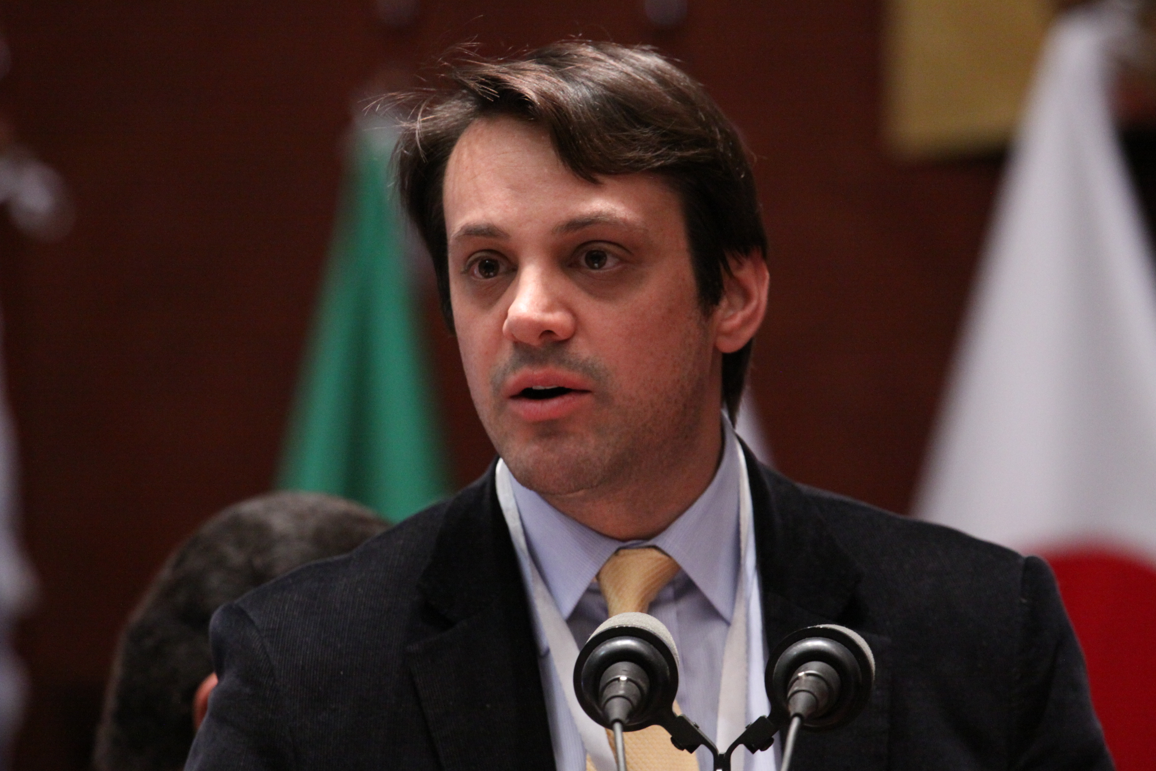 Quito, 12 enero de 2015.- Gaspar Rivas de la Delegación de Chile interviene en la Primera sesión plenaria y situación internacional: Política y Seguridad Fotografía: Hugo Ortiz / Asamblea Nacional